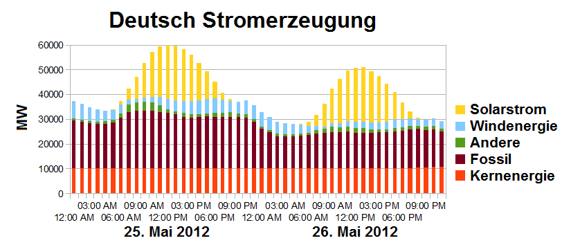 Deutsch Stromerzeugung 25-26-Mai-2012 - 22.000 MW Solarstrom